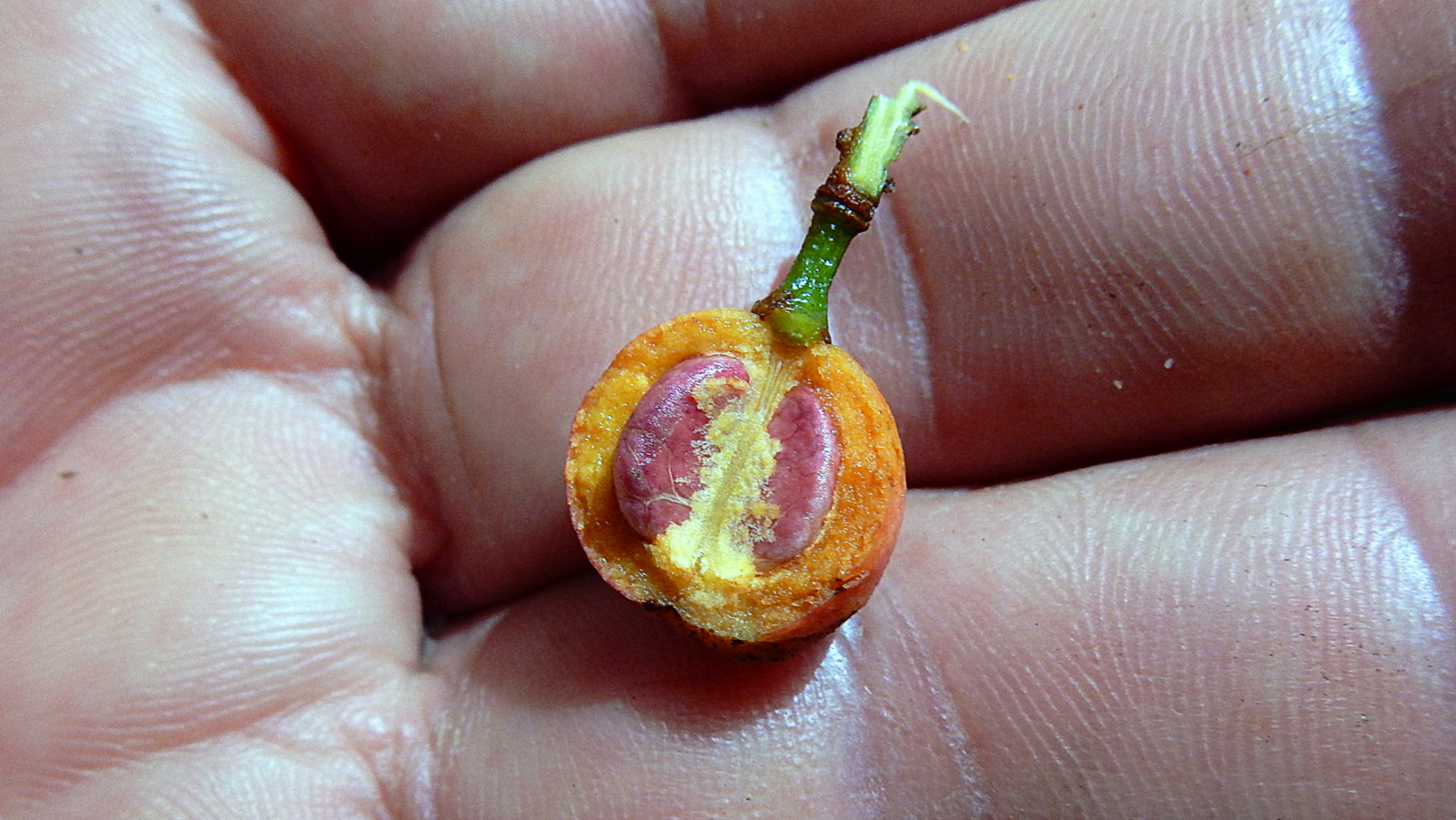 Picramnia glazioviana Engl.